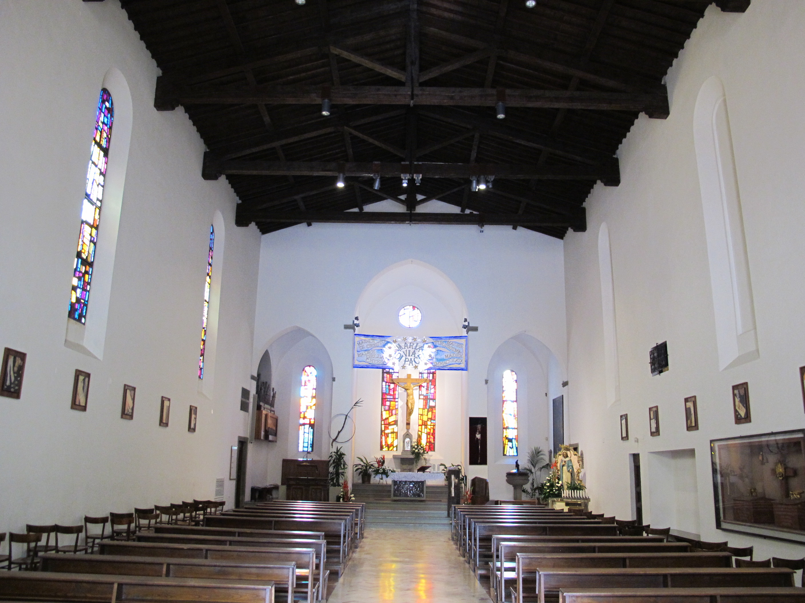 San bartolomeo a coiano, interno